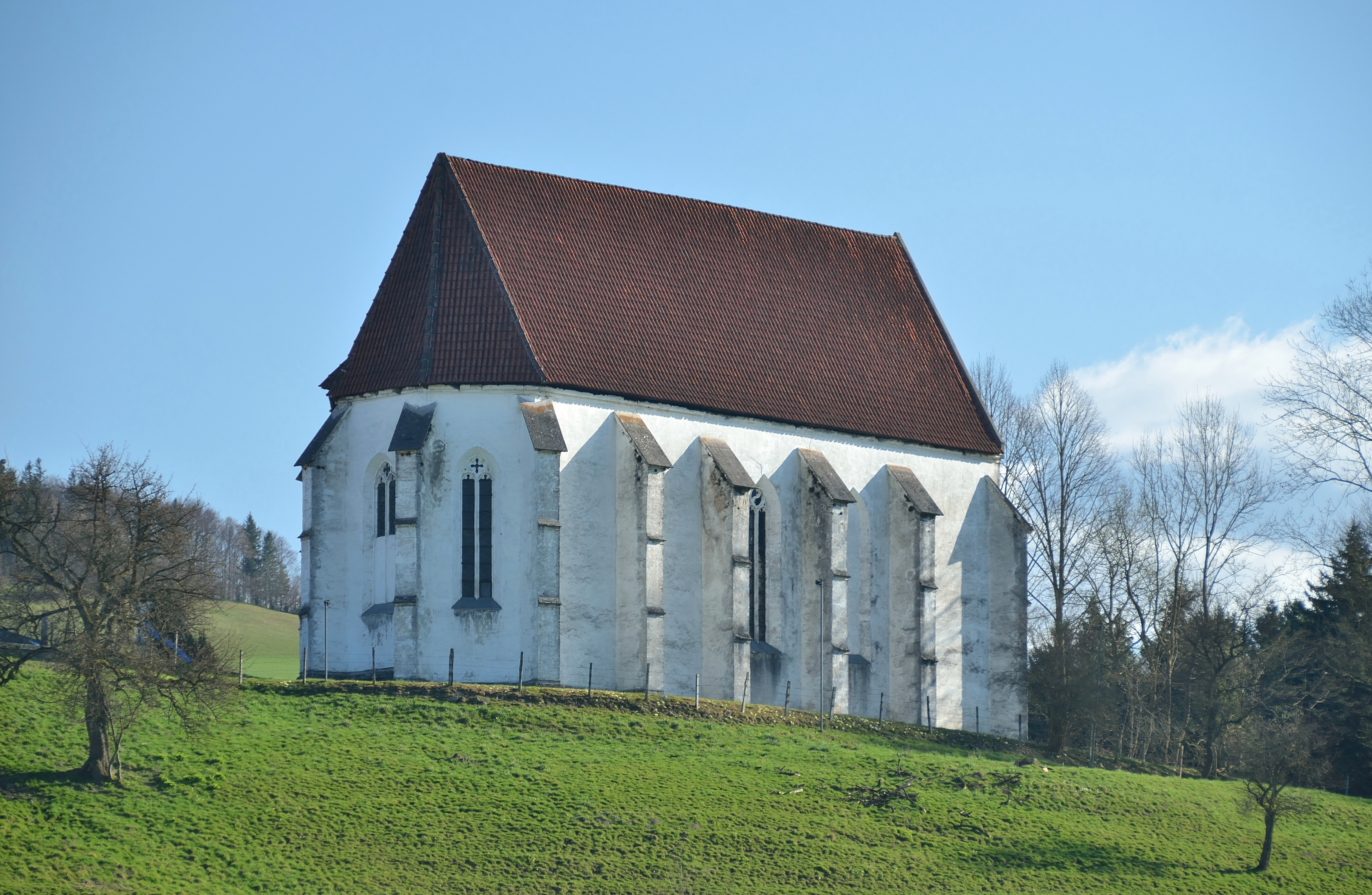 Kath. Filialkirche hl. Andreas in Tradigist, Gemeinde Kirchberg an der Pielach, Niederösterreich.